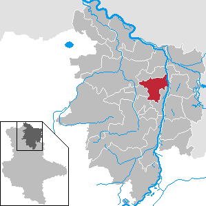 Hohenberg-Krusemark im Landkreis Stendal, Sachsen-Anhalt